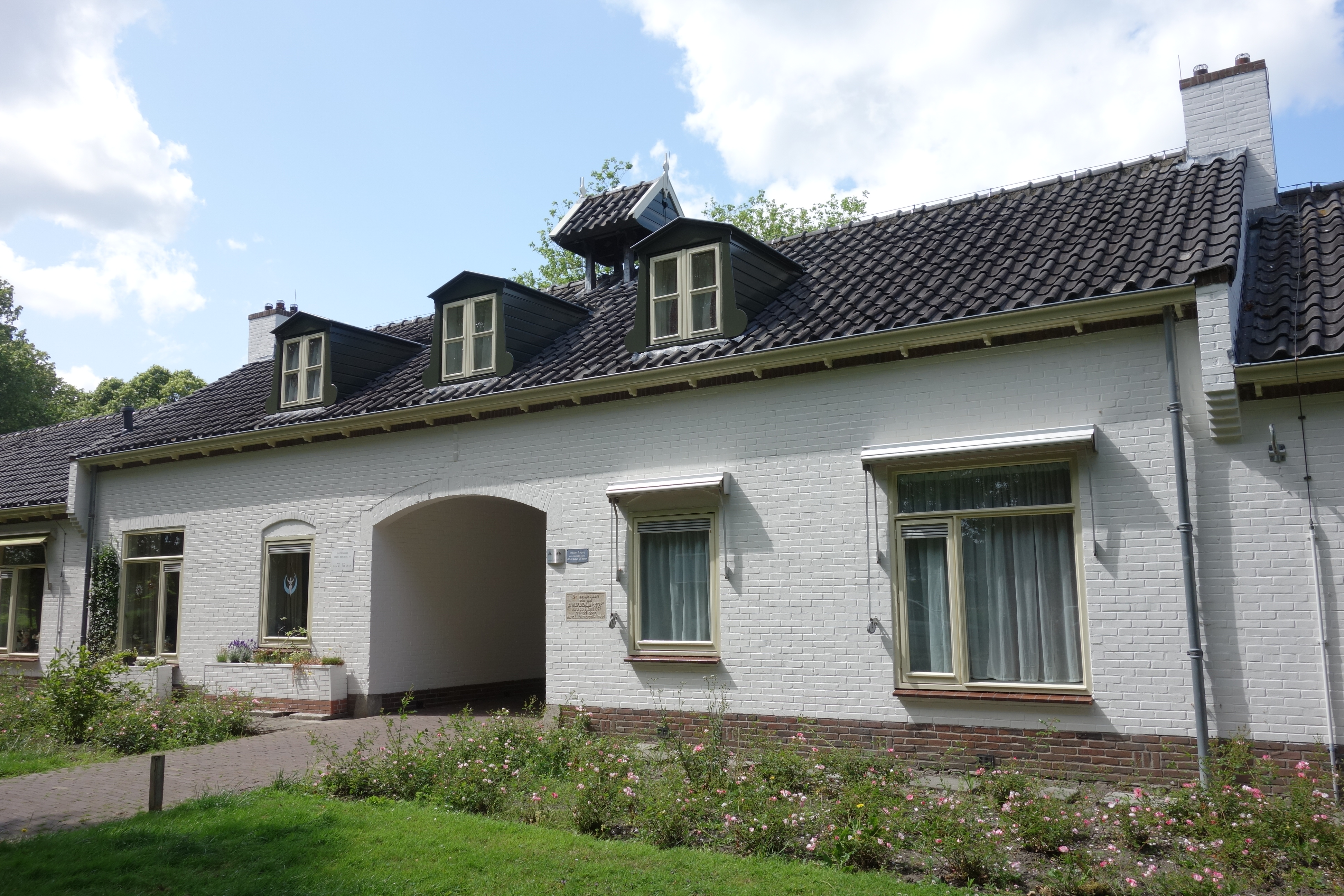 Hoofdentree van het Truydemanhof. Boven de poort is een dakruiter geplaatst waarin één klok.